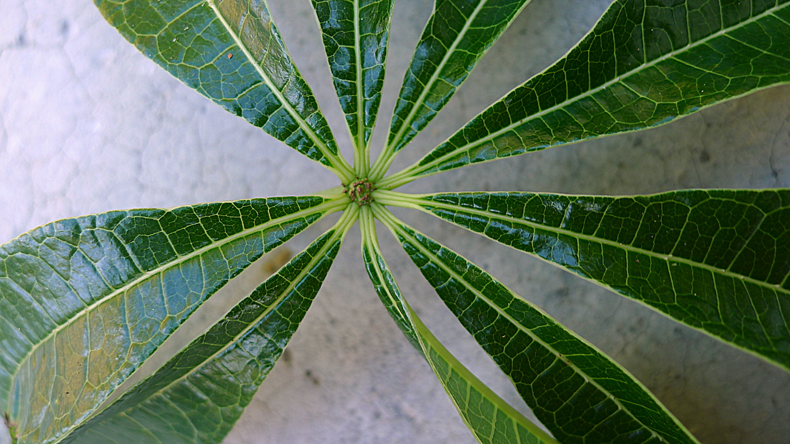 Jacaratia spinosa (Aubl.) A.DC.